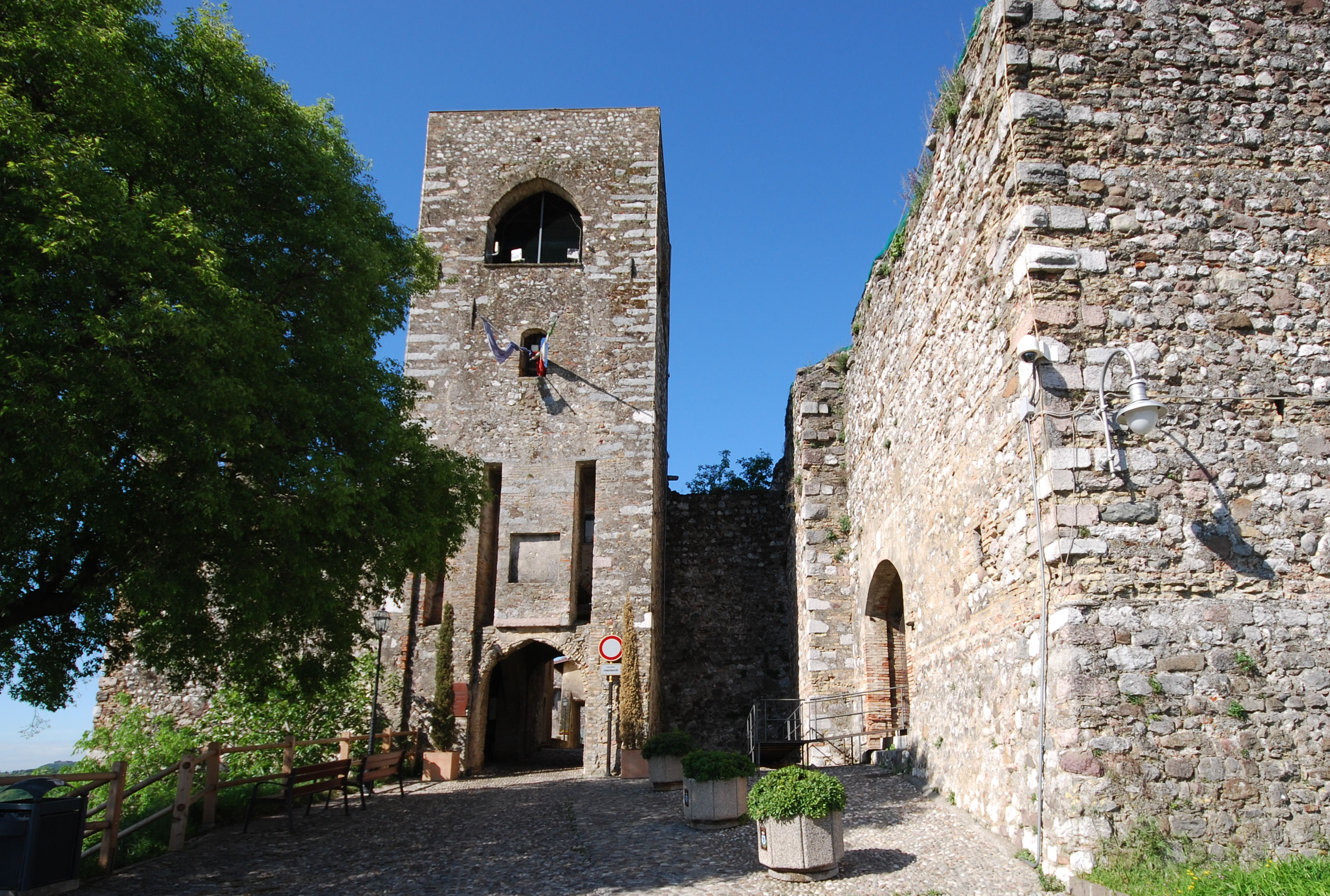 Padenghe sul Garda, entrata del castello.